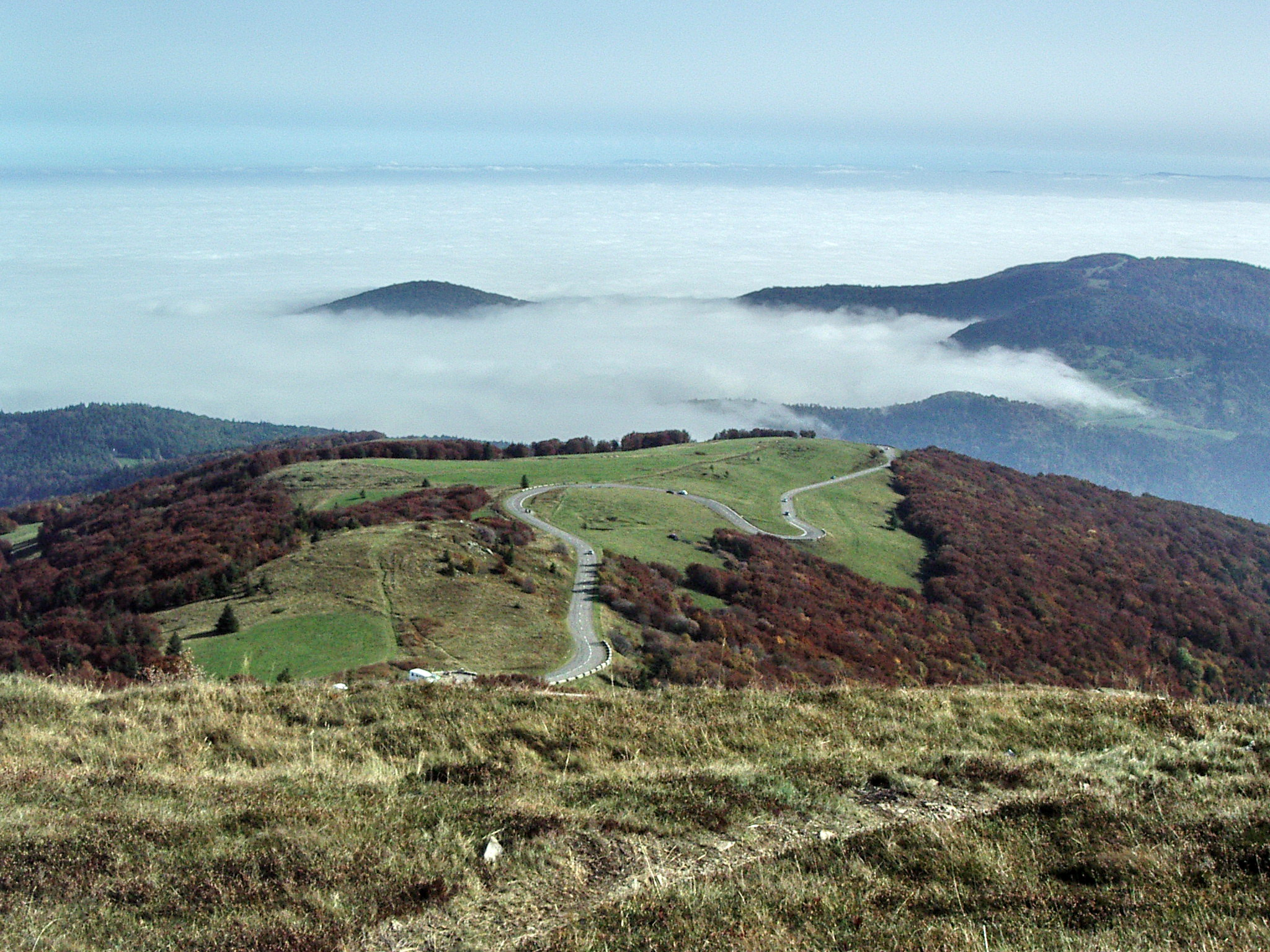 Vosges vues depuis le Grand Ballon, Alsace, France. La plaine d'Alsace est sous le brouillard alors que les sommets vosgiens sont ensoleillés.